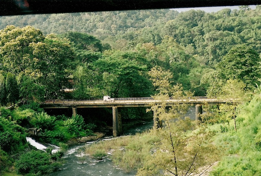 പെരുവണ്ണാമുഴി അണക്കെട്ടിന്റെ താഴെ ഭാഗത്തെ കാഴ്ച